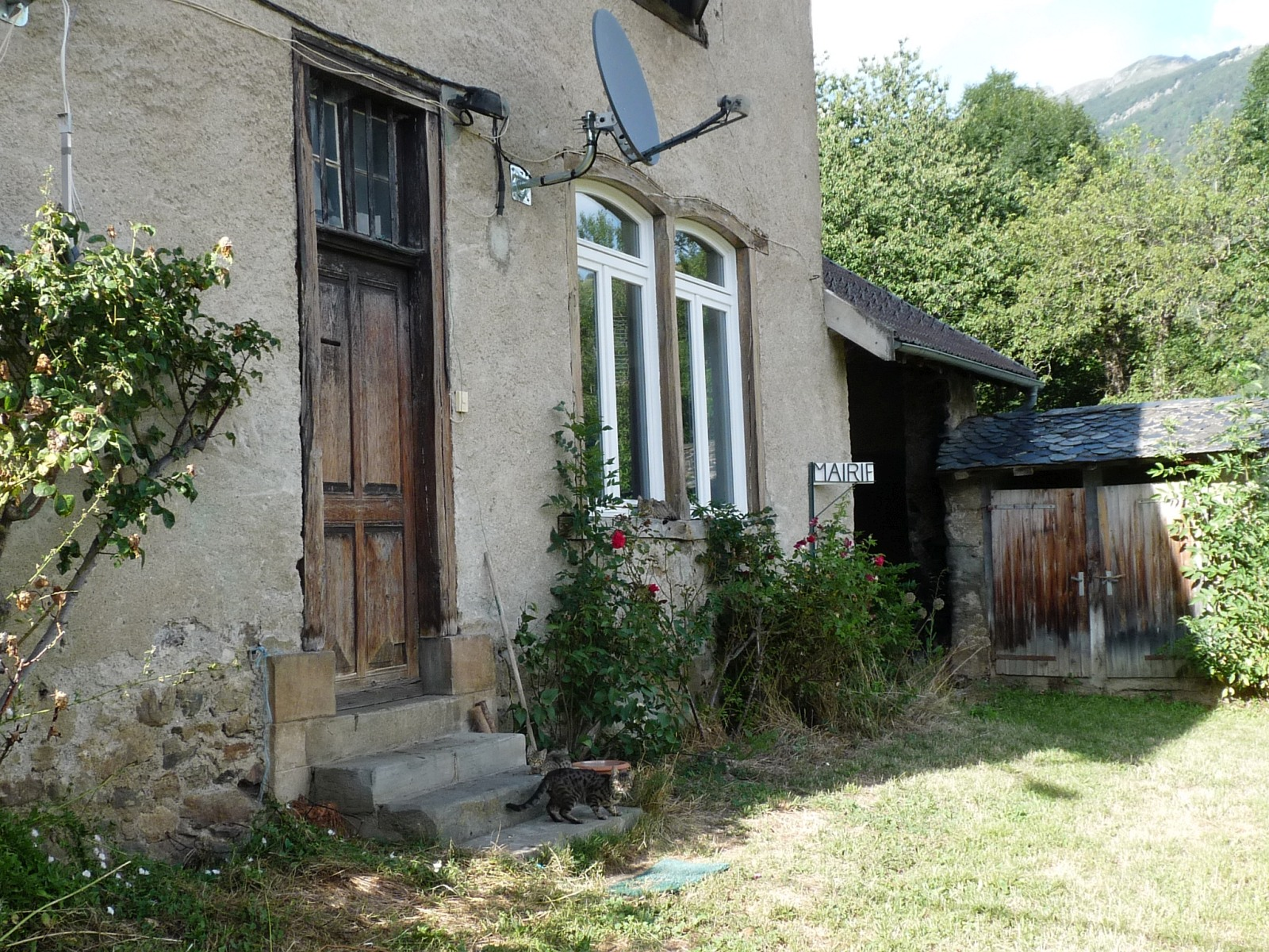 Mairie de Senconac, Ariège, France